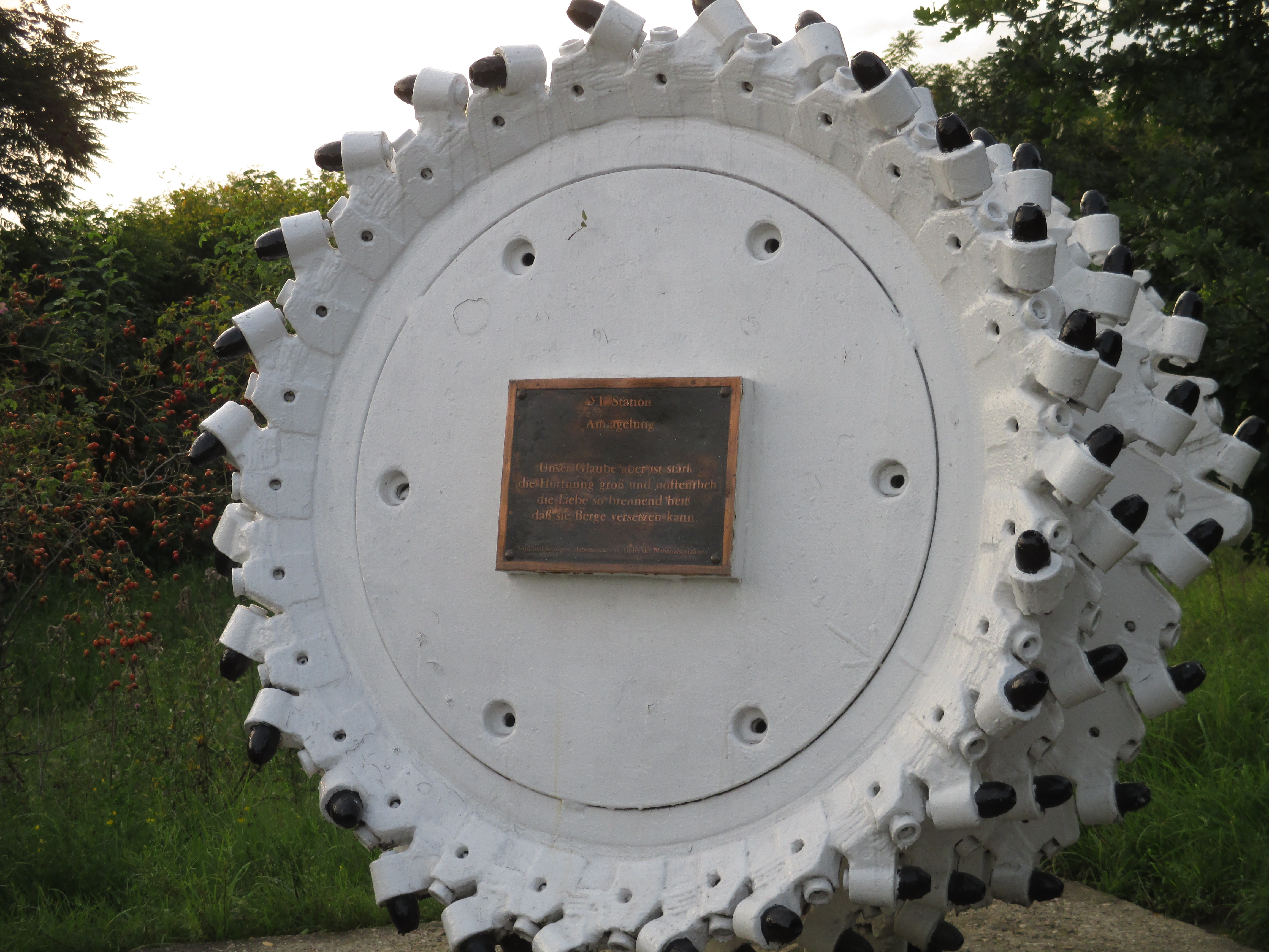 Station 11 des Bergbaukreuzweges an der Halde Haniel in Bottrop.